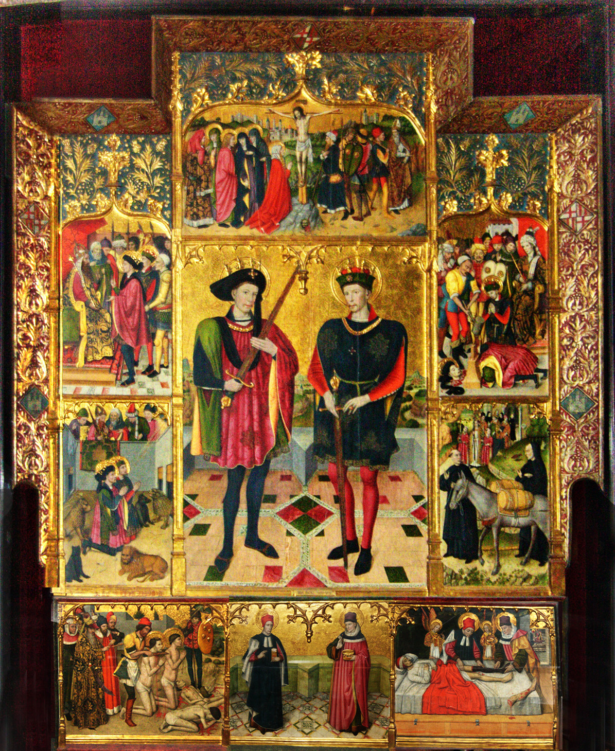 Representa els sants Abdó i Senén i la pradel.la és dedicada als sants metges Cosme i Damià. És una de les poques obres que es poden atribuir amb tota certesa a Jaume Huguet, ja que se'n conserva el contracte de l'any 1460. Huguet és l´únic representant català de la tendència flamenca, que domina el període final del gòtic. A la taula central hi són representants els sants titulars, Abdó i Senén, prínceps de Pèrsia que van ser capturats i morts a Roma. Per causes desconegudes, sembla que les relíquies d'aquests sants van ser traslladades a Arlés del Tec (Vallespir) i d'aquí la rao que gaudissin d'un culte ben arrelat a Catalunya, invocats com a patrons de la pagesia i coneguts com Sant Nin i Sant Non. Composen el reatule un Calvari i quatre escenes relatives als sants. A la pradel.la es descriuen escenes del matitiri i la mort dels sants Cosme i Damià, metges amb un possible origen àrab i, com els anteriors, també molt venerats a Catalunya. Al guardapols, decoracions de tipus vegetals i les armes de Terrassa i Barcelona. Actualment es troba a l'Església de Sant Pere de Terrassa.